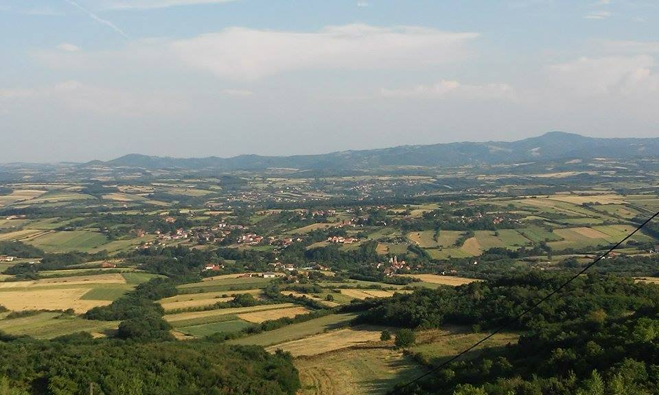 Srpski (latinica): Pogled na Dobrovodicu sa Straževice